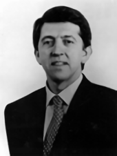 Armando Caro Figueroa